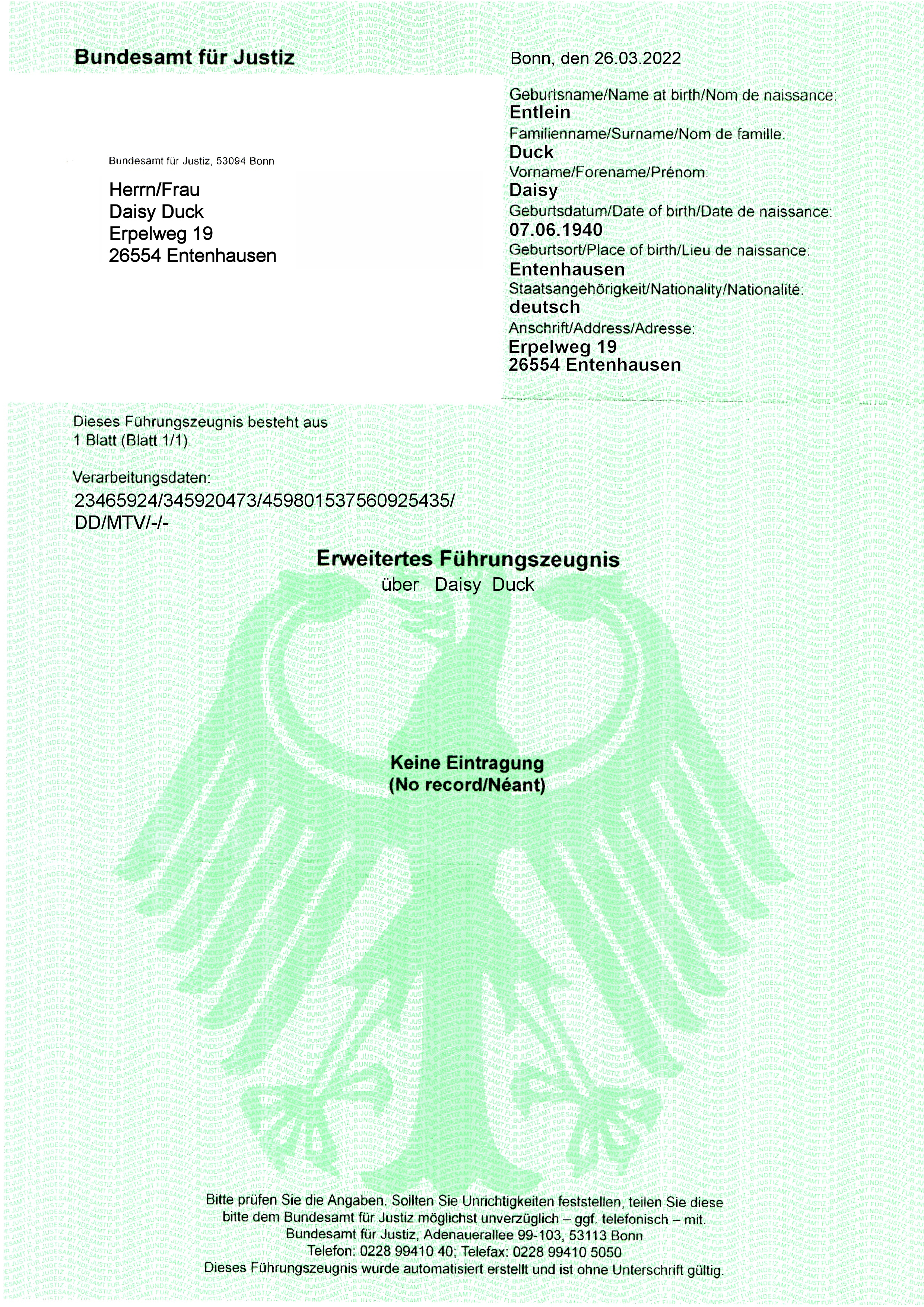 Anonymisiertes "Erweitertes Führungszeugnis" des Bundesamt für Justiz